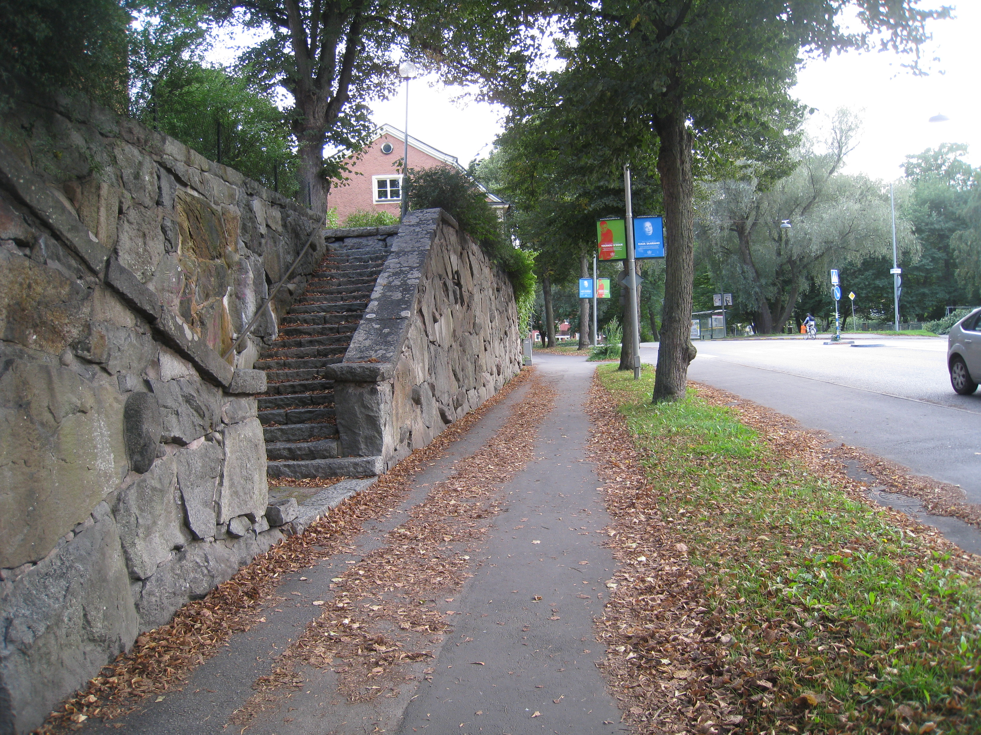 Alviksvägen 7-13, Bromma, väster om Stockholm. Vy med parti av stödmuren.